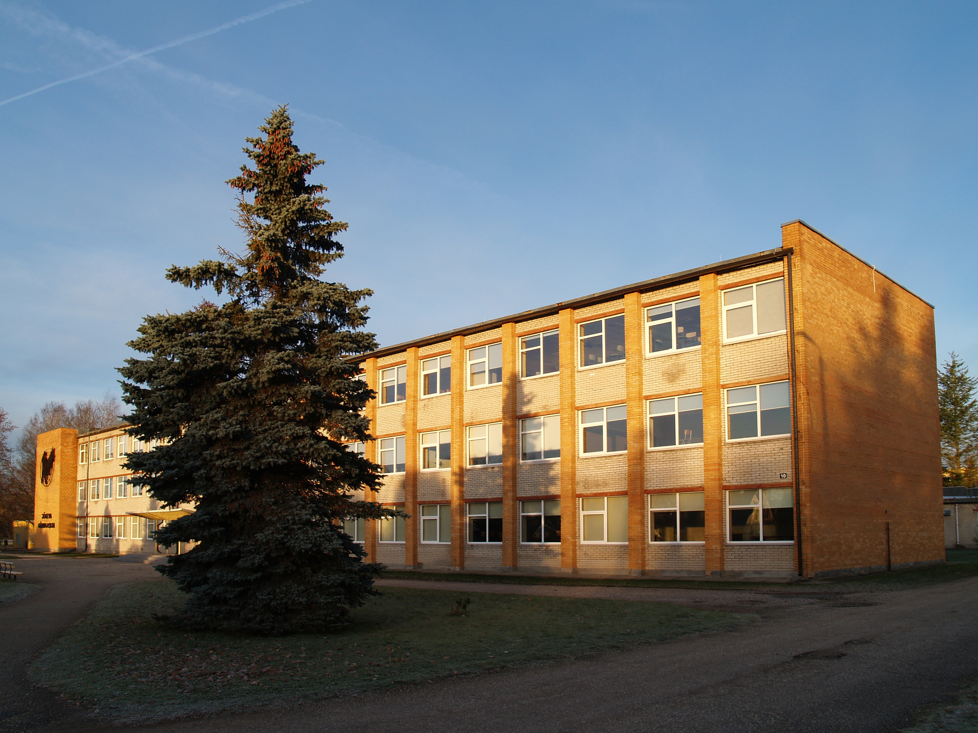 Jõgeva Gümnaasium